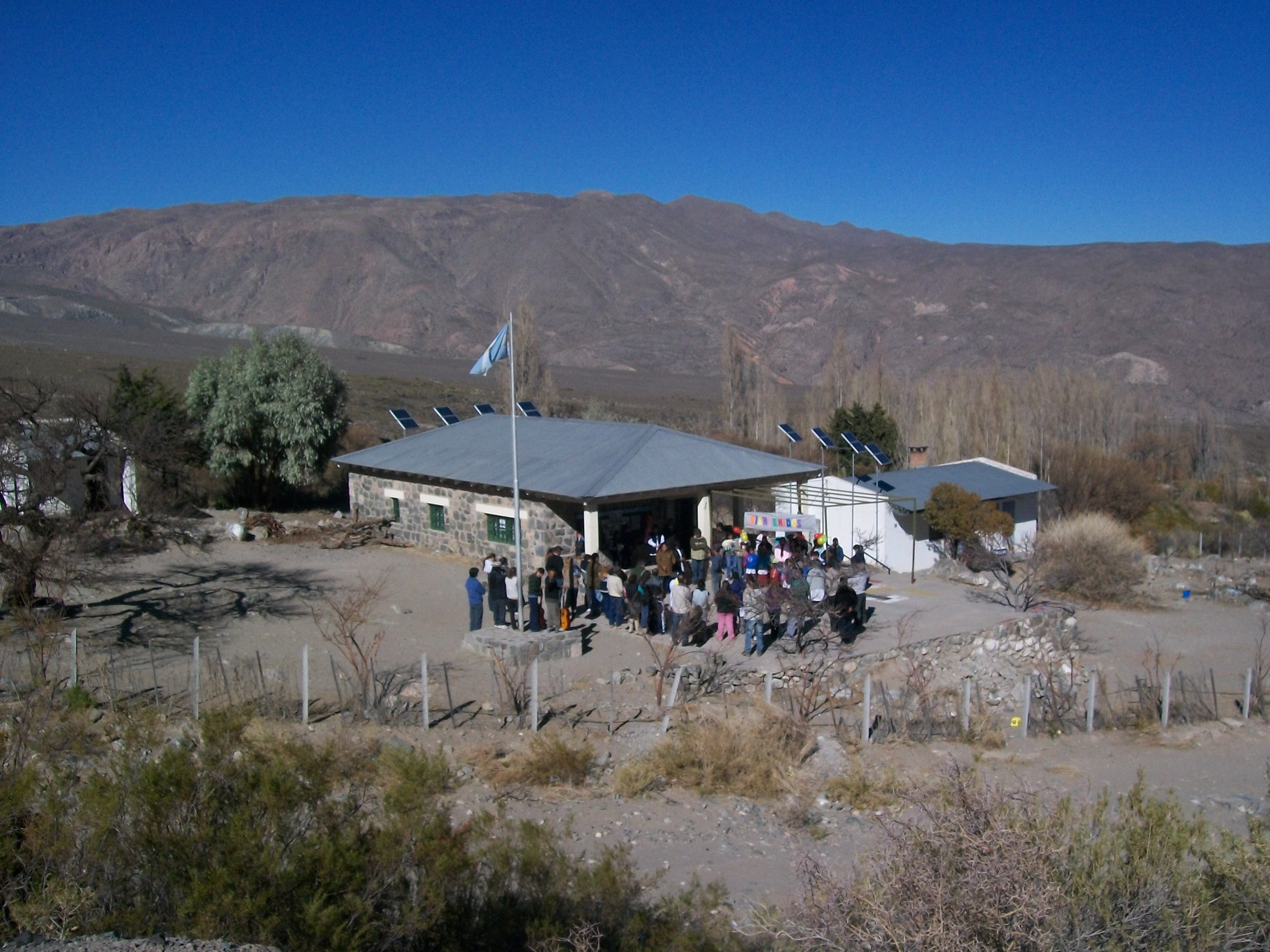 Acto de reapertura del ciclo lectivo, luego del receso de invierno, escuela rural Manuela Pedraza, Abra del Infiernillo, ( Amaichá del valle), Tucumán, Argentina.